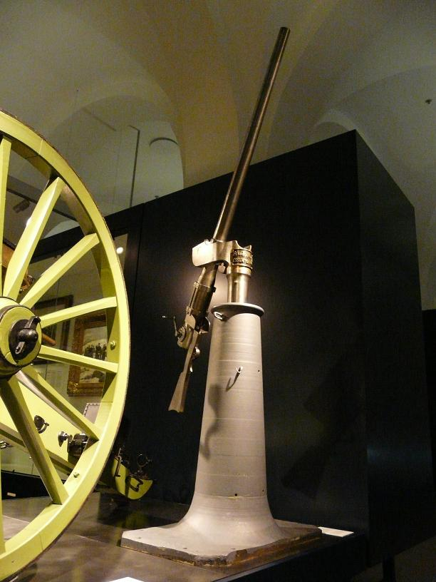 Krupp'sche Ballonkanone im Militärhistorischen Museum der Bundeswehr in Dresden.